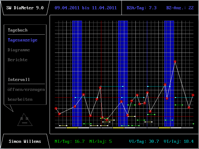 Dieses Bild zeigt ein Tagesanzeigendiagramm in SW DiaMeter Version 9.0, welches eine Blutzuckerkurve, Broteinheiten und Insulinspritzungen von 3 Tagen anzeigt. Es wird die Zeitspanne von 9 bis 14 Uhr hervorgehoben.